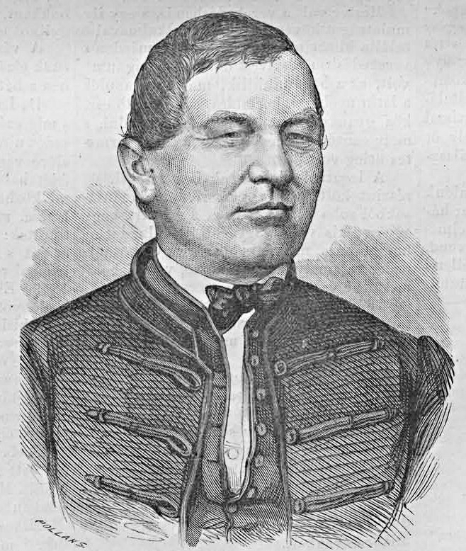 Czékus István (1818–1890) evangélikus püspök